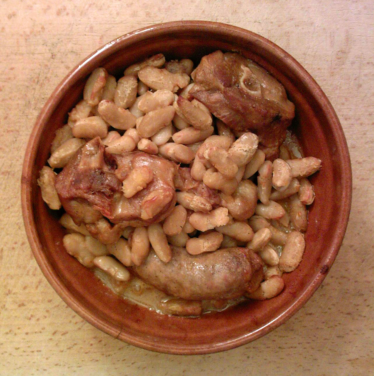 Cassoulet cuit